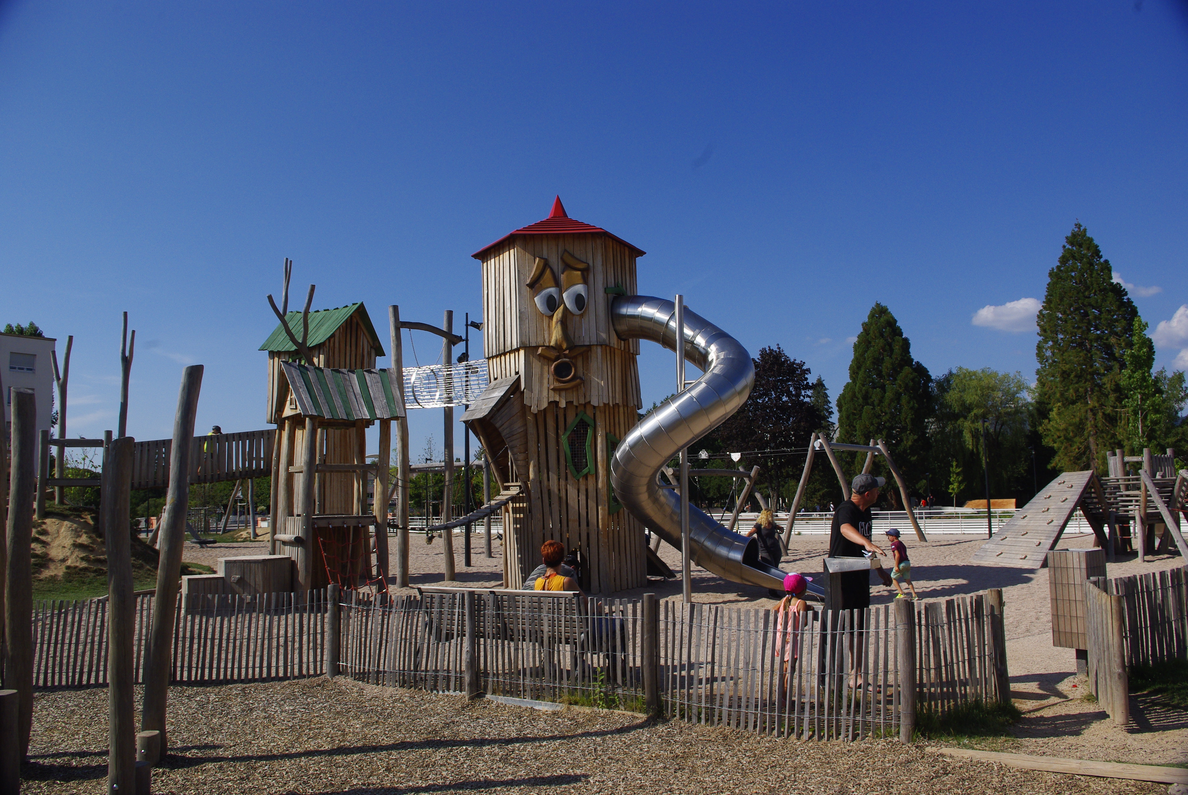 Vue partielle de l'aire de jeux pour enfants ouverte en 2018 et situé rive gauche de la Meurthe à l'emplacement de l'ancienne piscine municipale.